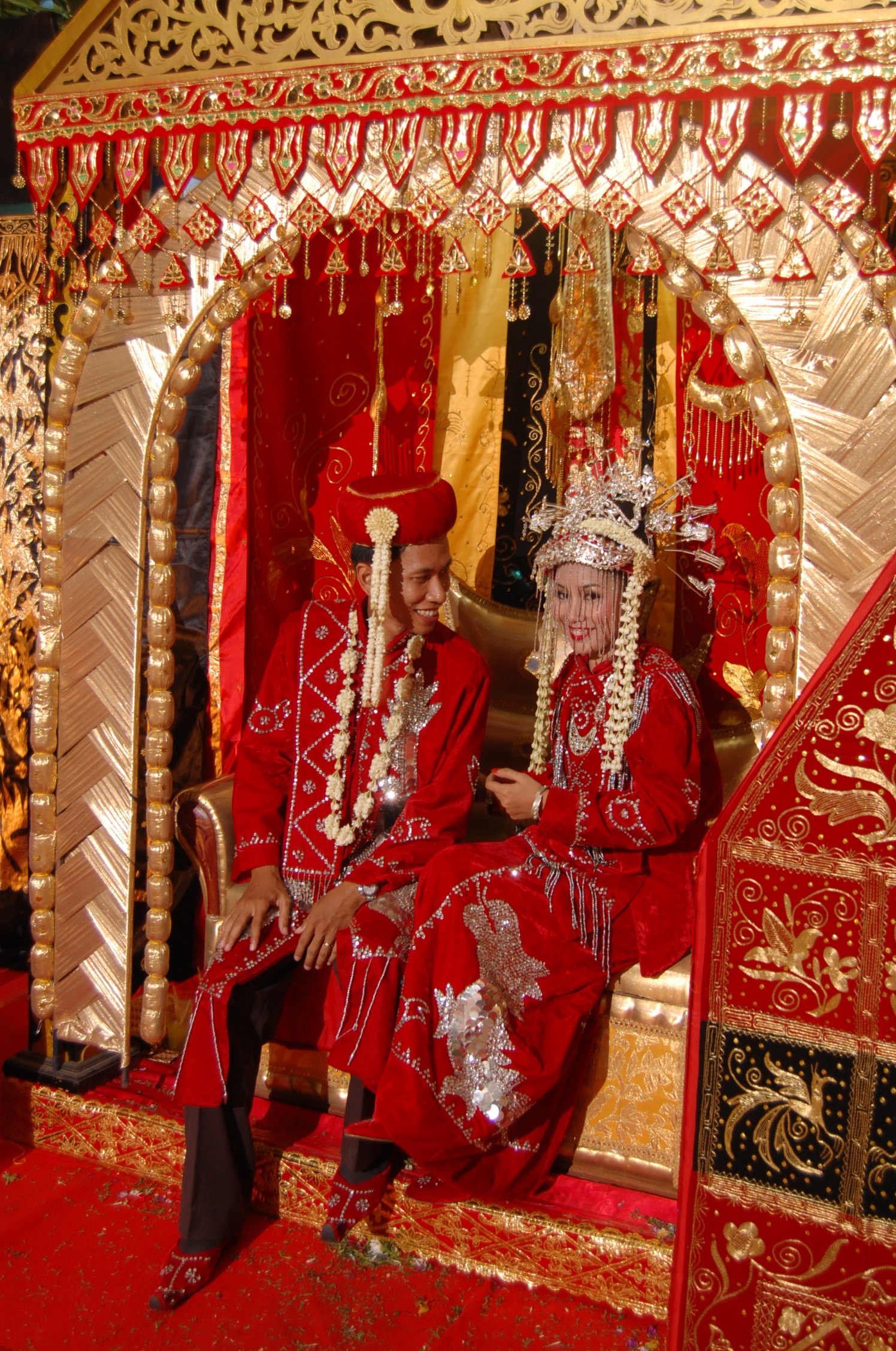 wedding ceremony